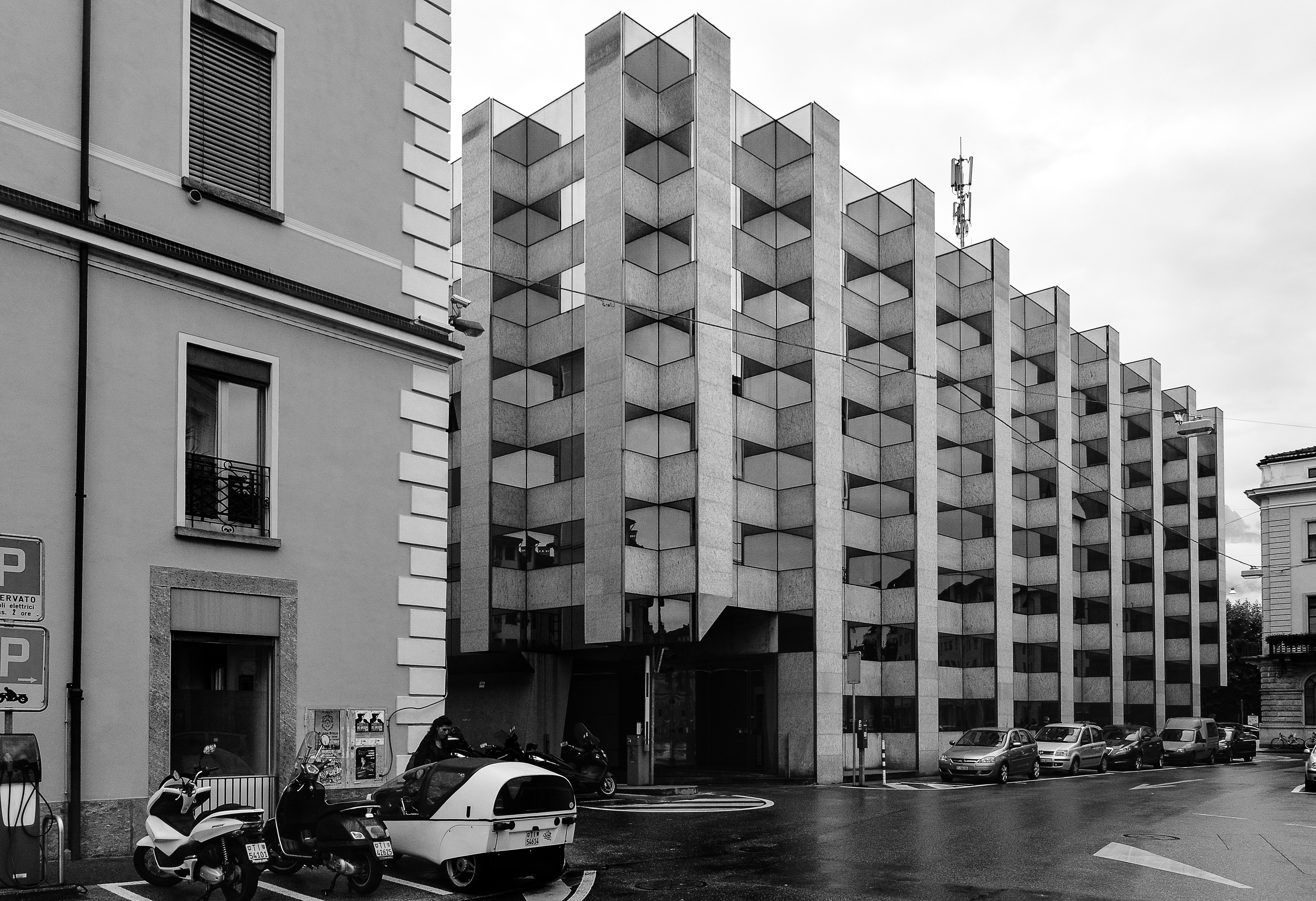 Edificio Postale, Locarno. Retro.